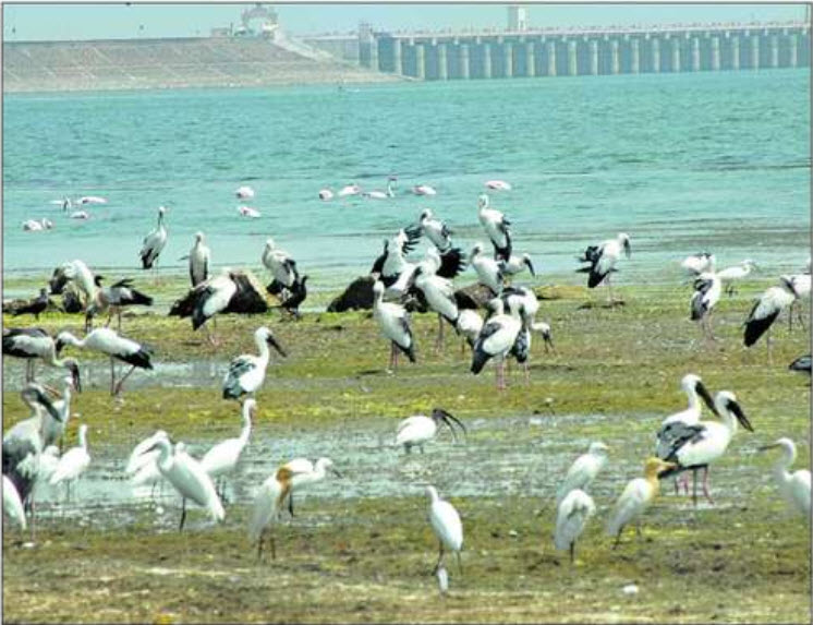 Migratory birds at Jayakwadi dam Aurangabad.